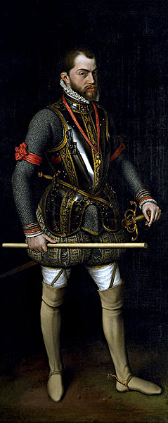 Retrato del rey Felipe II de España (1527-1598).